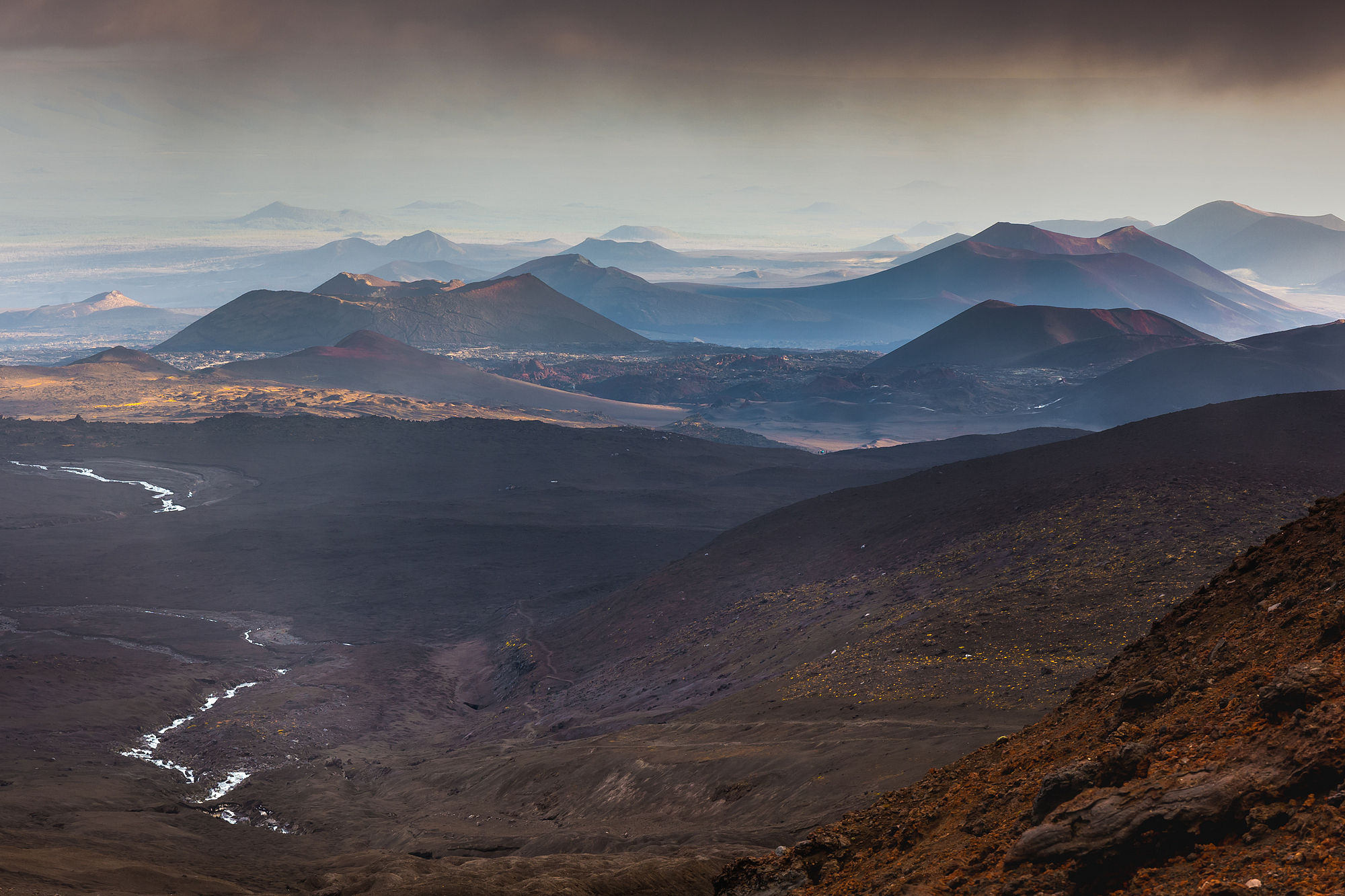 Северный и Южный прорывы Большого трещинного Толбачинского извержения 1975-1976 гг.: Северный прорыв - географические координаты - 55°41’14'‘с.ш.,160°14’38'‘в.д. Южный прорыв - географические координаты - 55°35’50'‘с.ш., 160°11°00'‘в.д, Мильковский район, Камчатский край This image is related to the protected area of Russia number 4110117